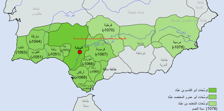 طائفة إشبيلية، وتوسّع ممتلكات بنو عبَّاد في الأندلس خلال القرن الحادي عشر الميلادي.